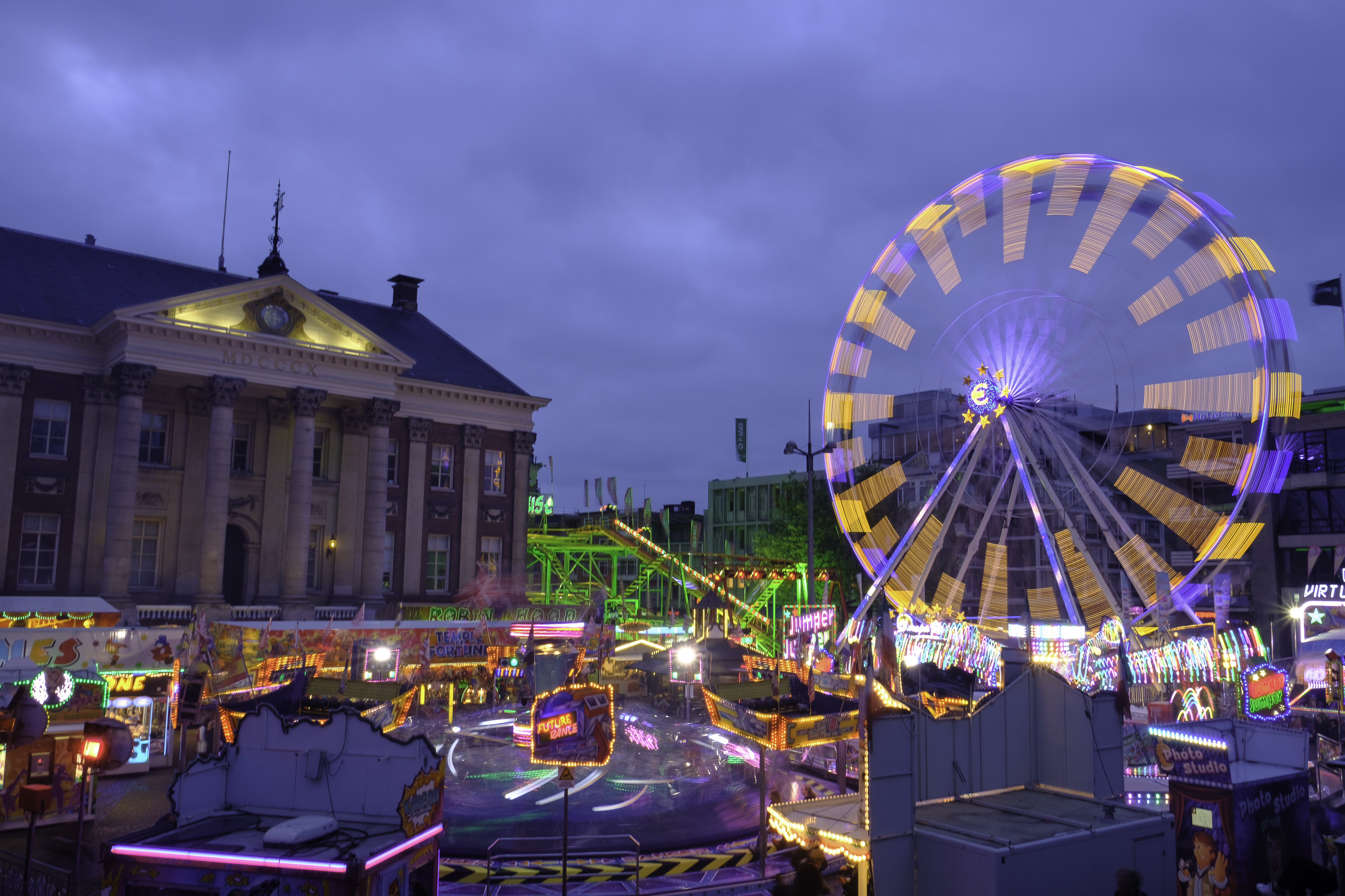 Meikermis in Groningen voor het stadhuis